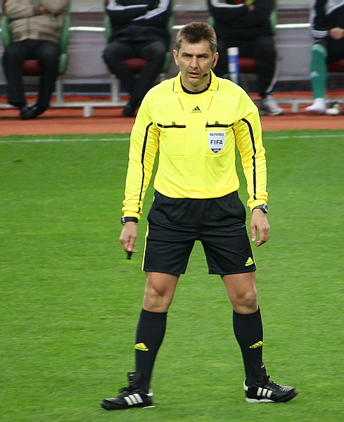 Alexander Gvardis